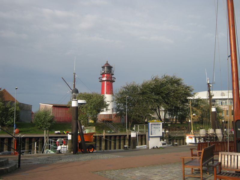 Blick über den Museumshafen auf den Büsumer Leuchtturm